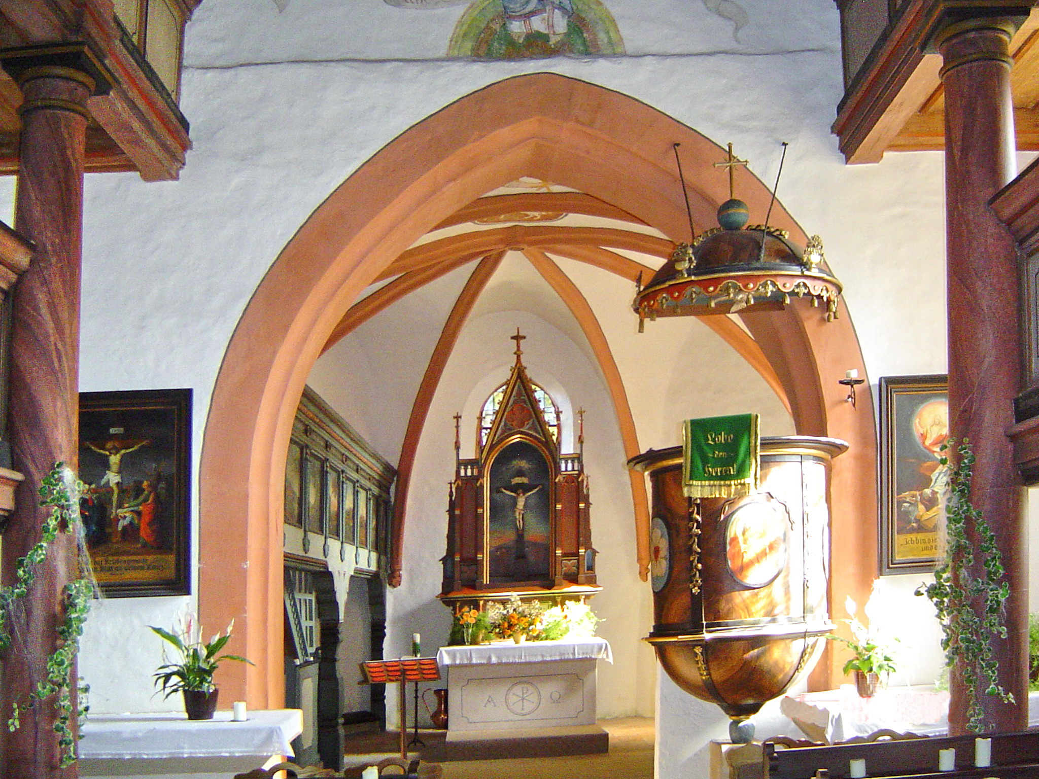 Obernsees, Evangelisch-lutherische Rupertuskapelle, Innenaufnahme, Sankt-Rupertus-Straße 155, Denkmalgeschütztes Gebäude (Akten-Nr. D-4-72-167-20)